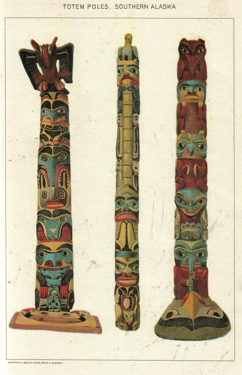 Painting